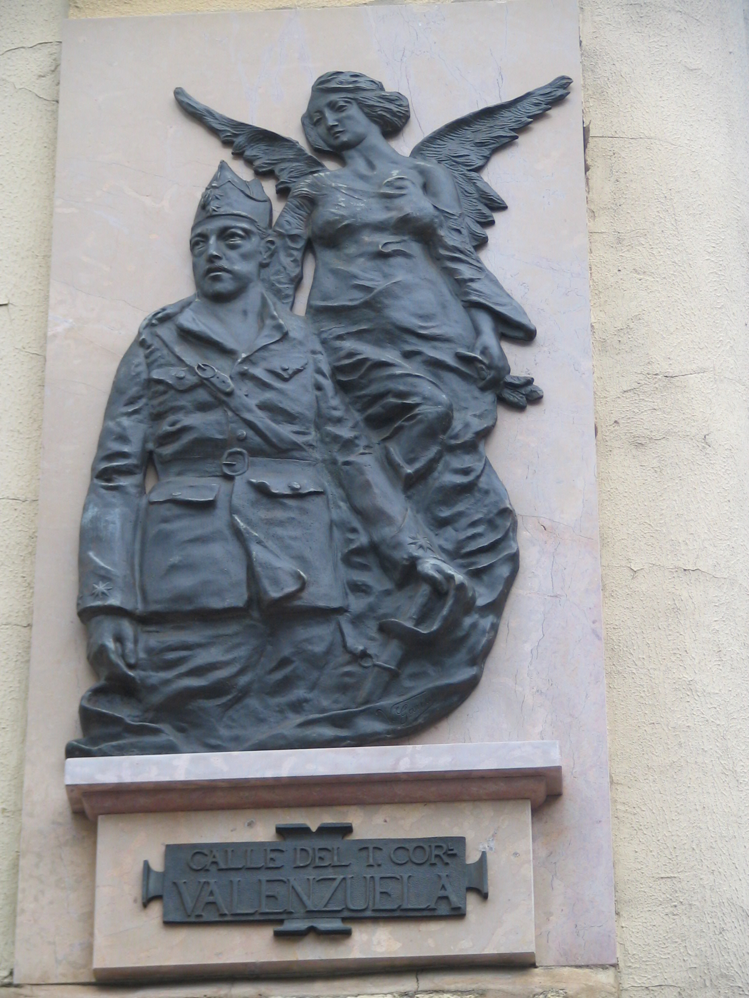 Escultura del Teniente General Valenzuela en plaza Salamero de Zaragoza